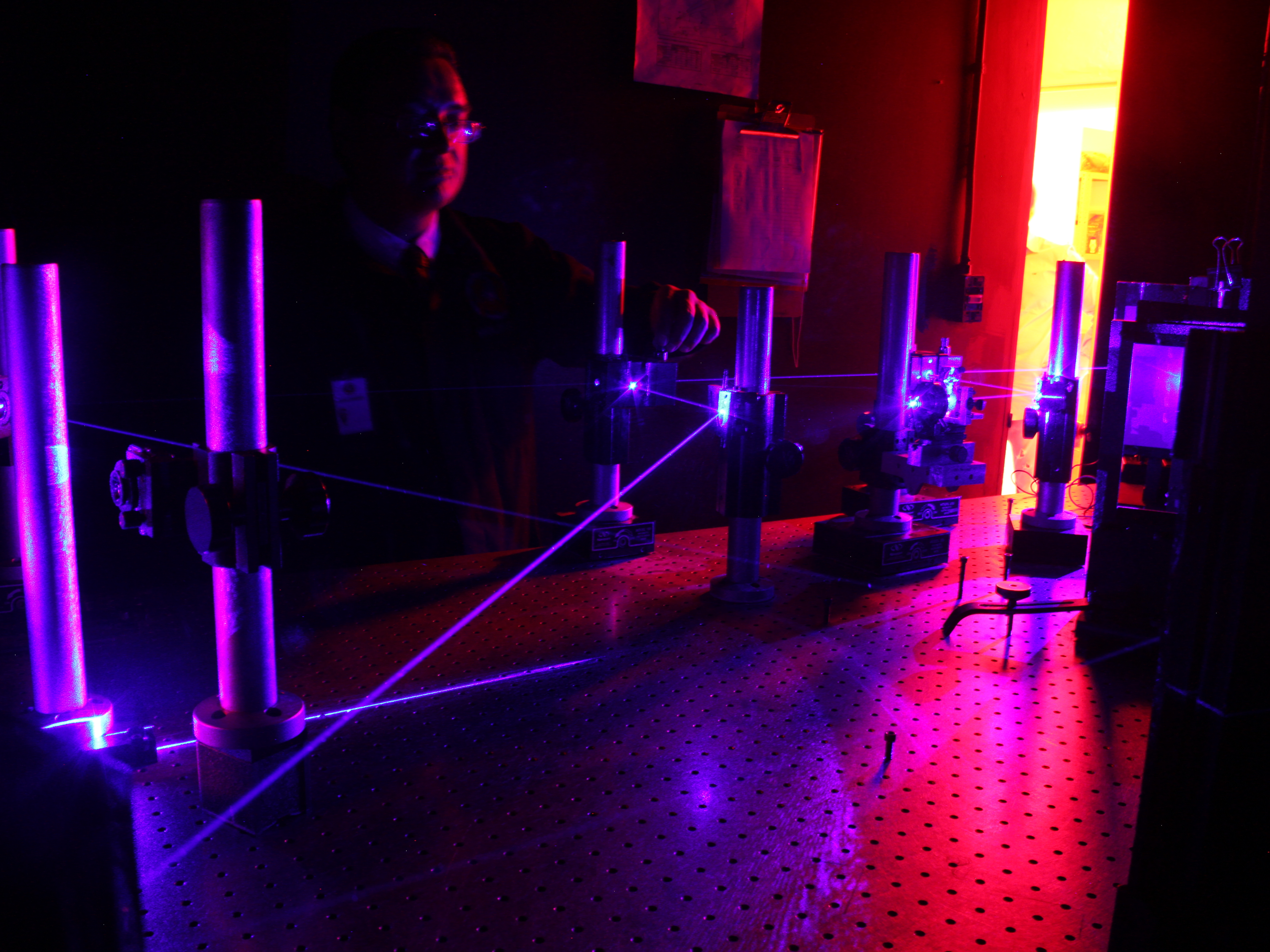 Fotografía de la mesa holográfica usada en Holomex.